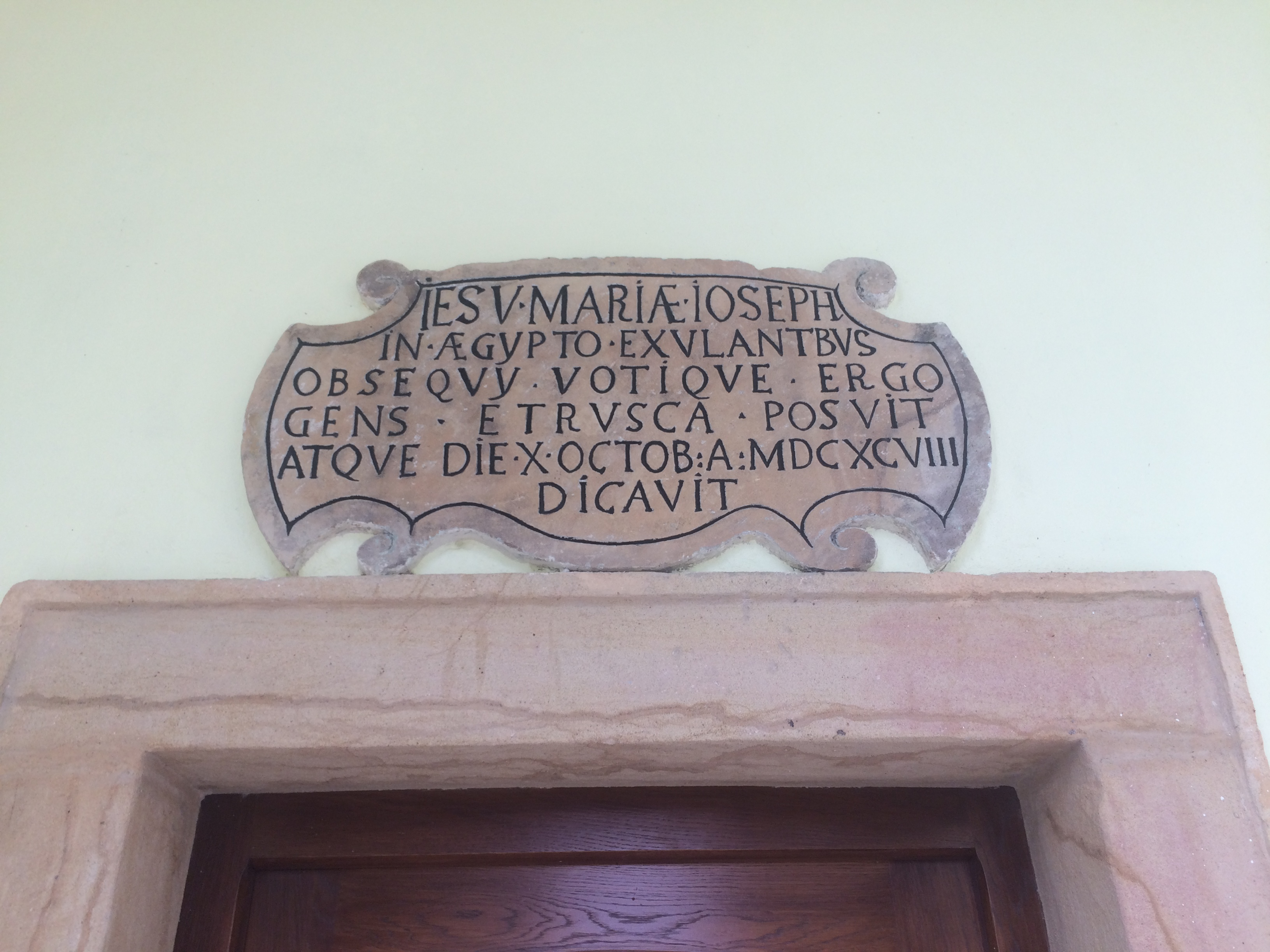 Kaple, srpen 2018